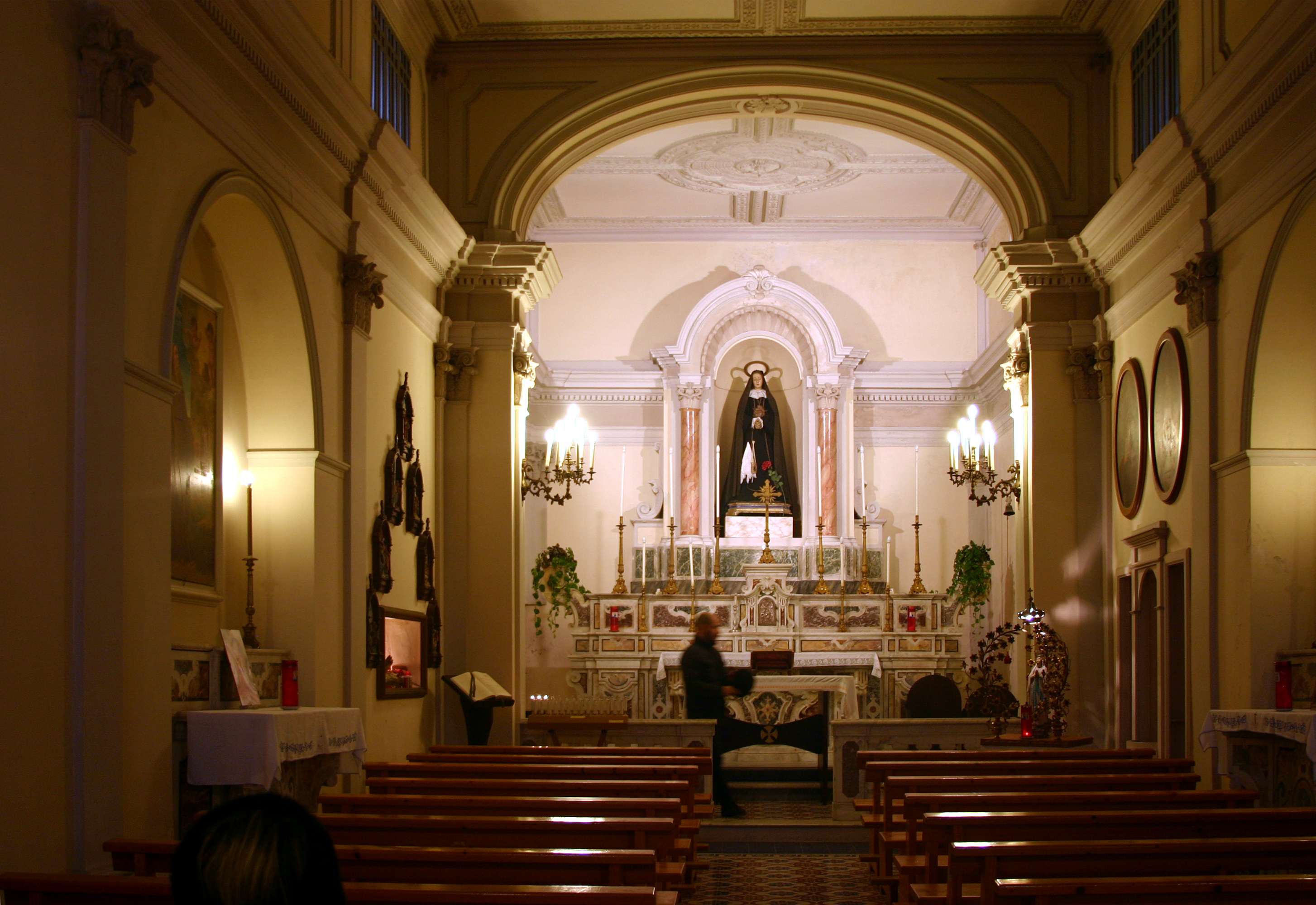 Maratea